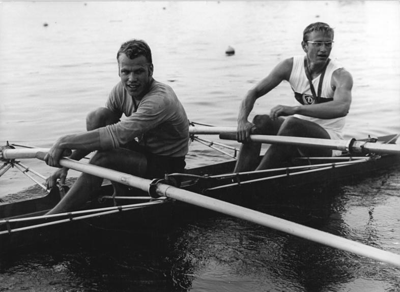 Hans-Ulrich Schmied, Joachim Böhmer Zentralbild Franke 20.7.70 Brandenburg (Havel): DDR-Meisterschaften im Rudern (Finale am 19.7.70)- Die Berliner Kombination Hans-Ulrich Schmied (links)- Joachim Böhmer (RG SC Berlin-Grünau-SC Dynamo Berlin) holte sich den Meistertitel im Doppelzweier.